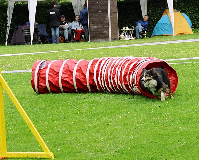 Agility fester Tunnel